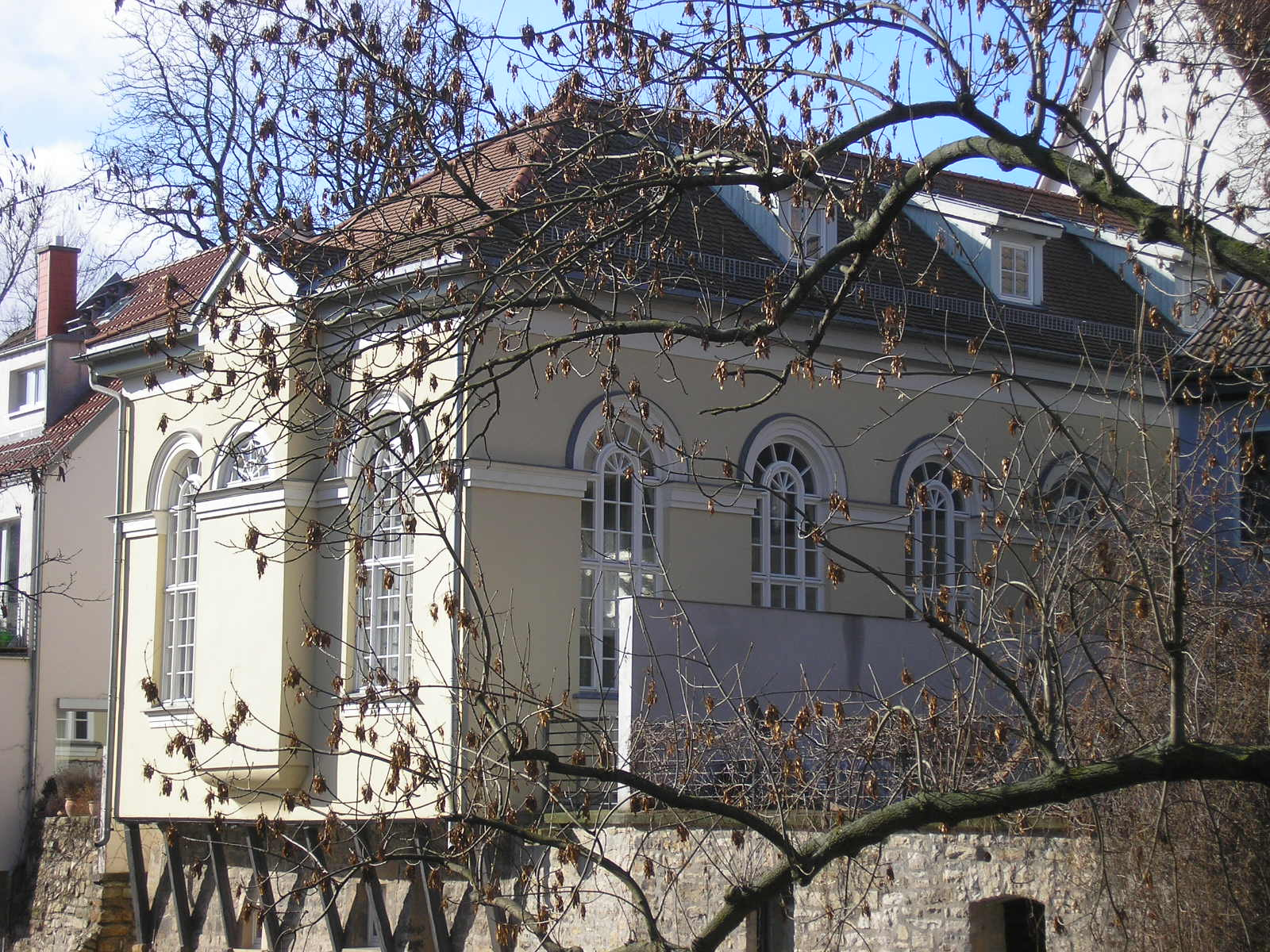 Die Kleine Synagoge in Erfurt (Thüringen).